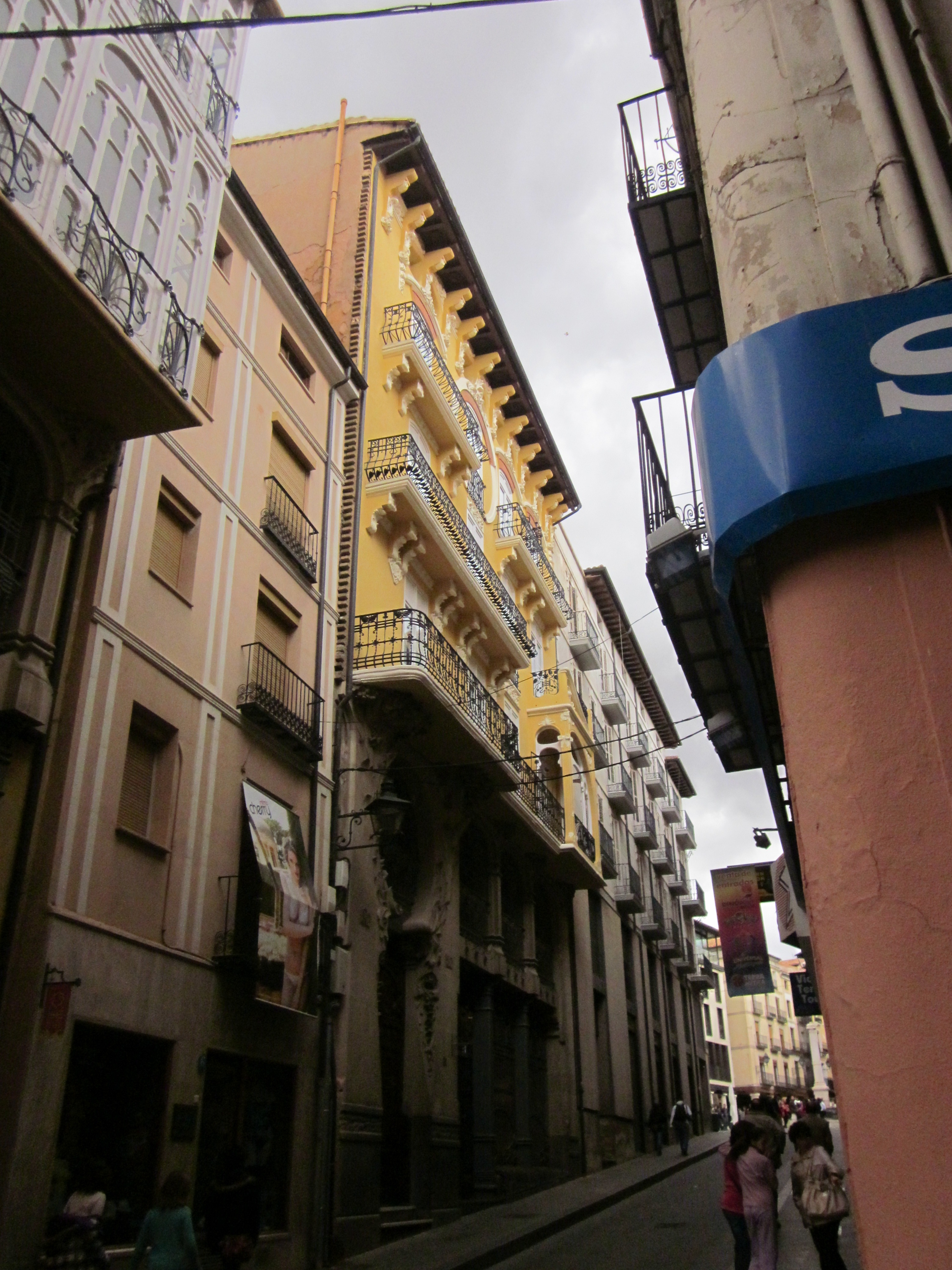 Vista de la Casa Ferrán en la Calle Nueva de Teruel. Aragón, España.